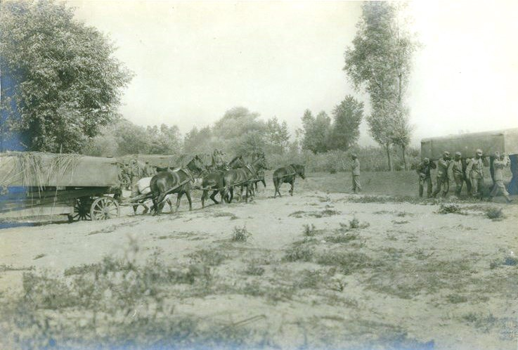 Снимка на австро-унгарски войници пренасящи части за строеж на понтонен мост.